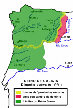 Mapa do Reino de Galicia durante a dinastía dos suevos (s. V-VI)